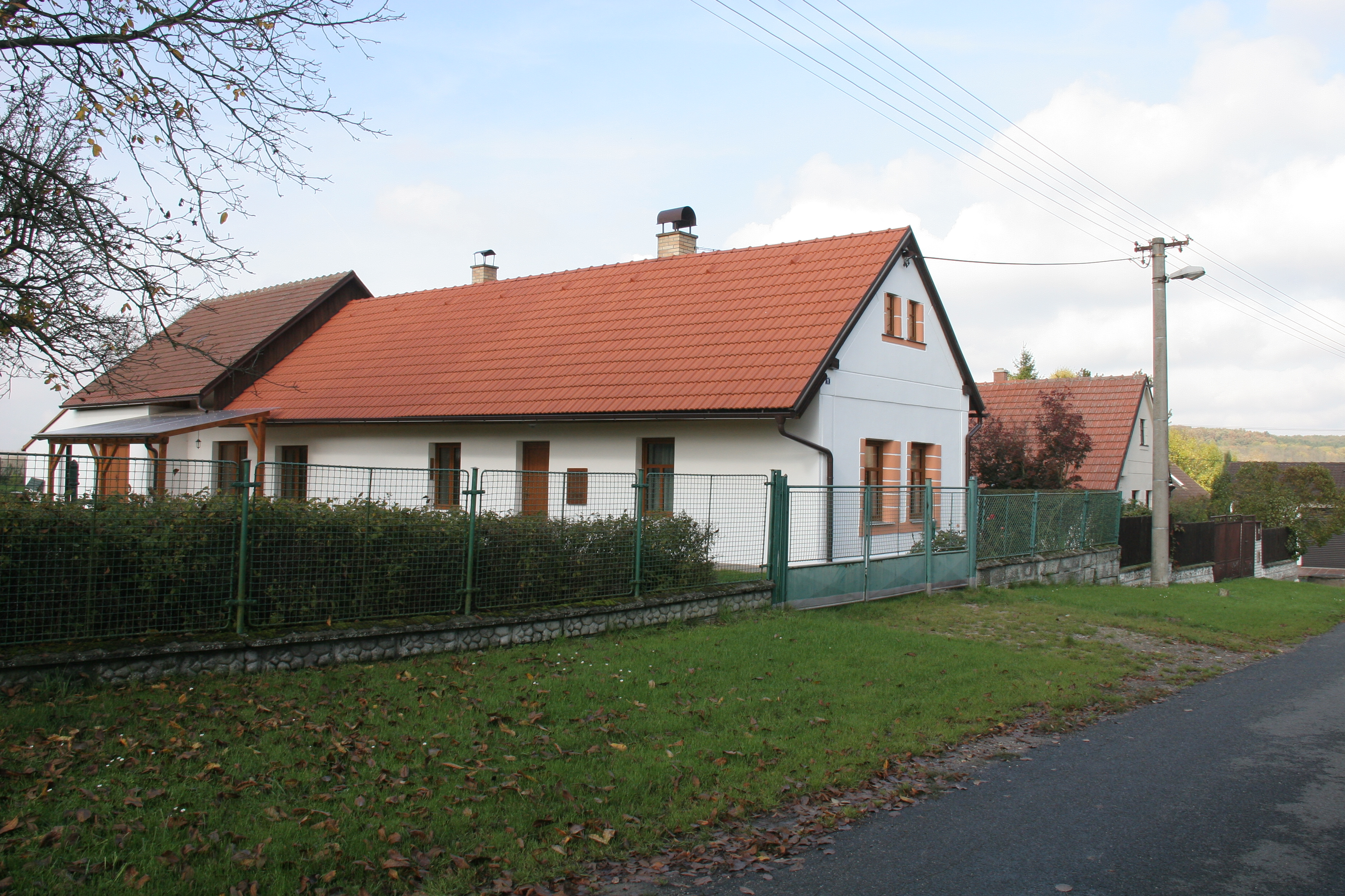 zbraň čp. 12